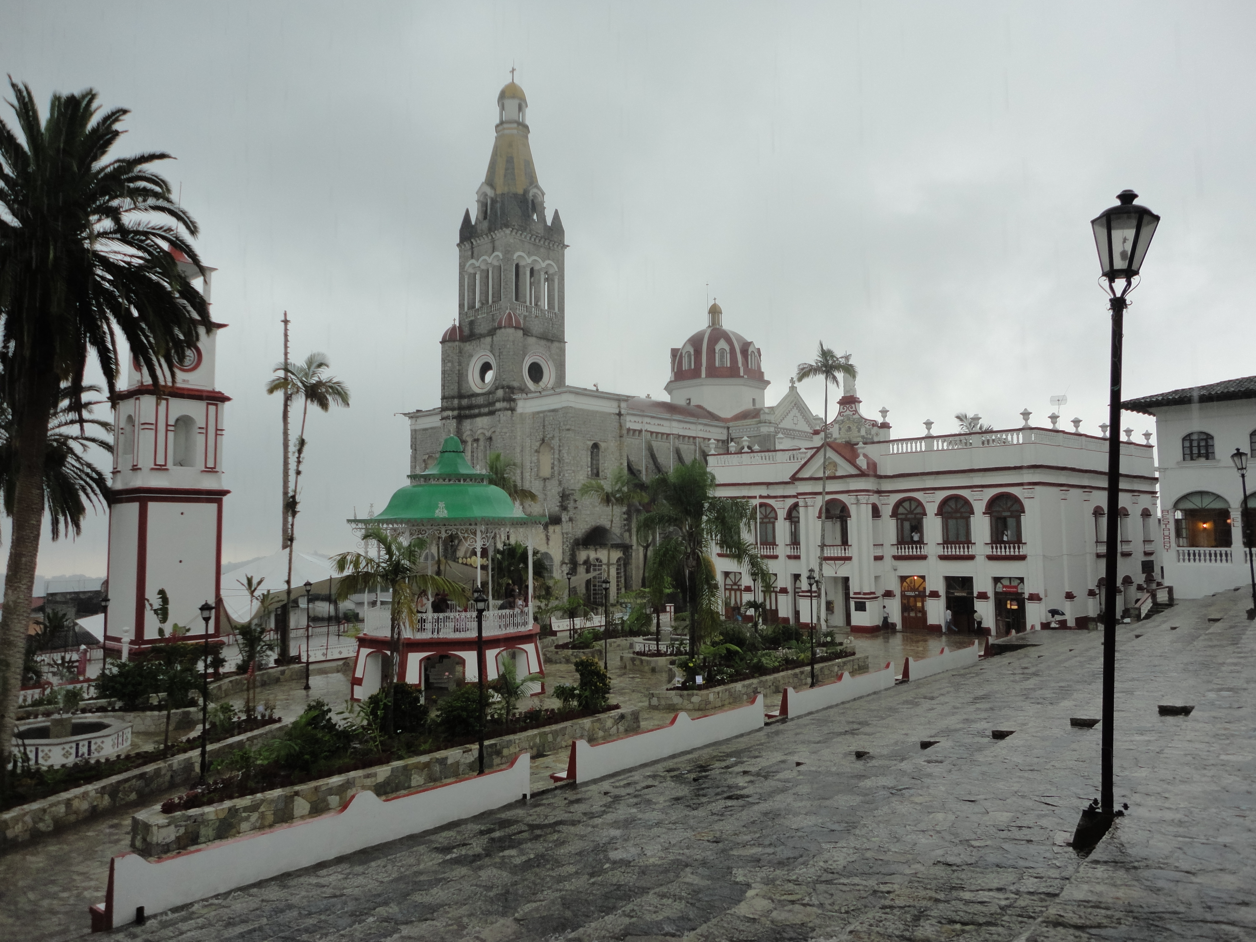 Vista popular